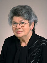 Maria Pańczyk-Pozdziej (ur. 10 lipca 1942 w Tarnowskich Górach) – polska nauczycielka, dziennikarka, propagatorka kultury i gwary śląskiej, senator VI i VII kadencji.